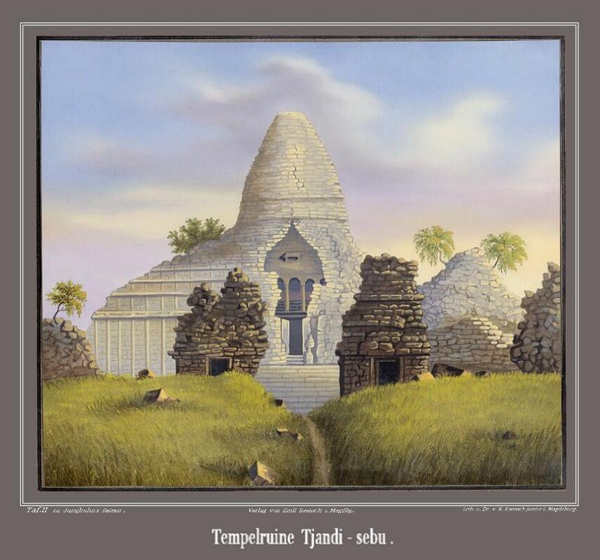 Tjandi-sebu. Aus dem Tafelband